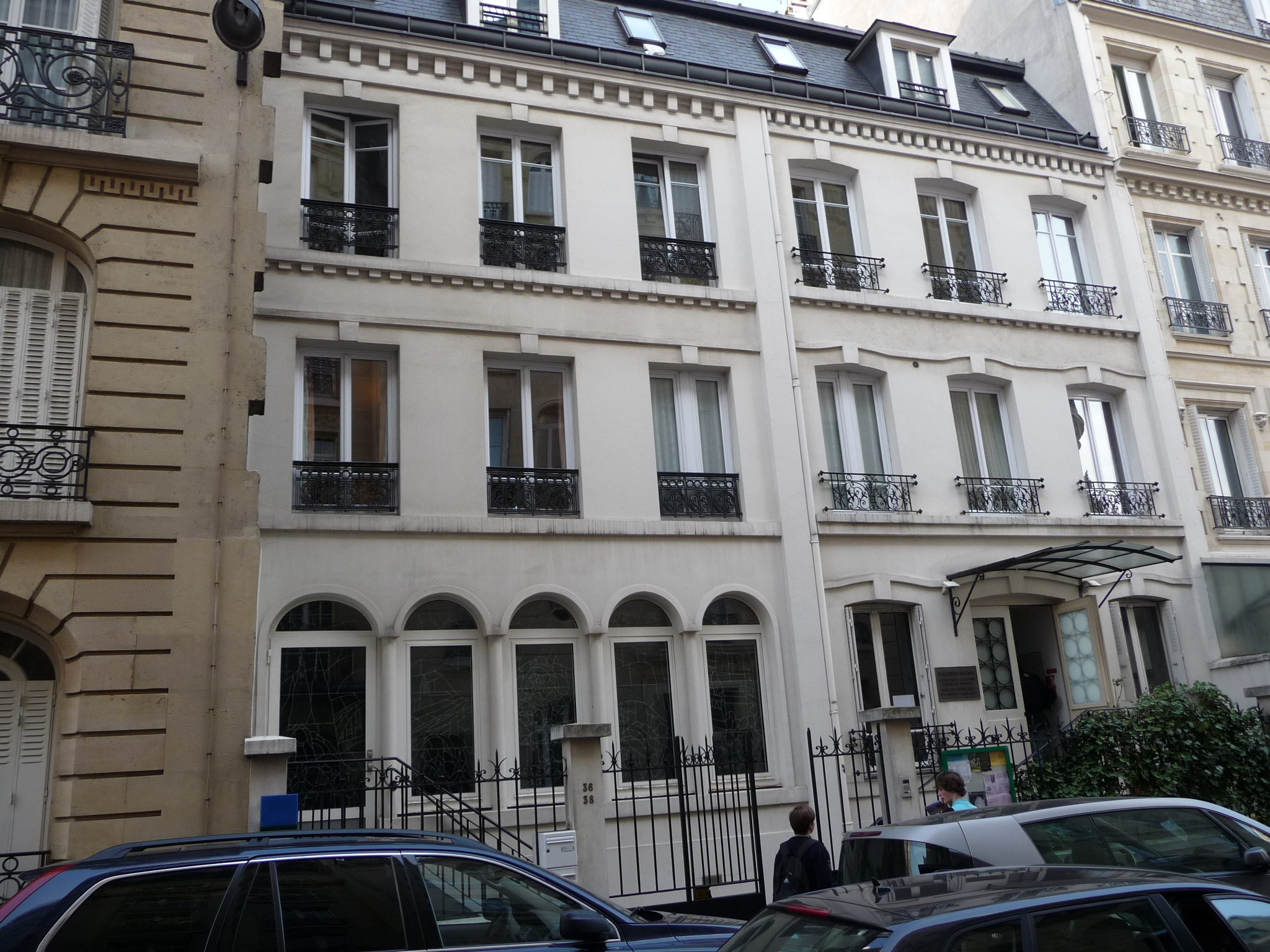 Blick auf das Gotteshaus